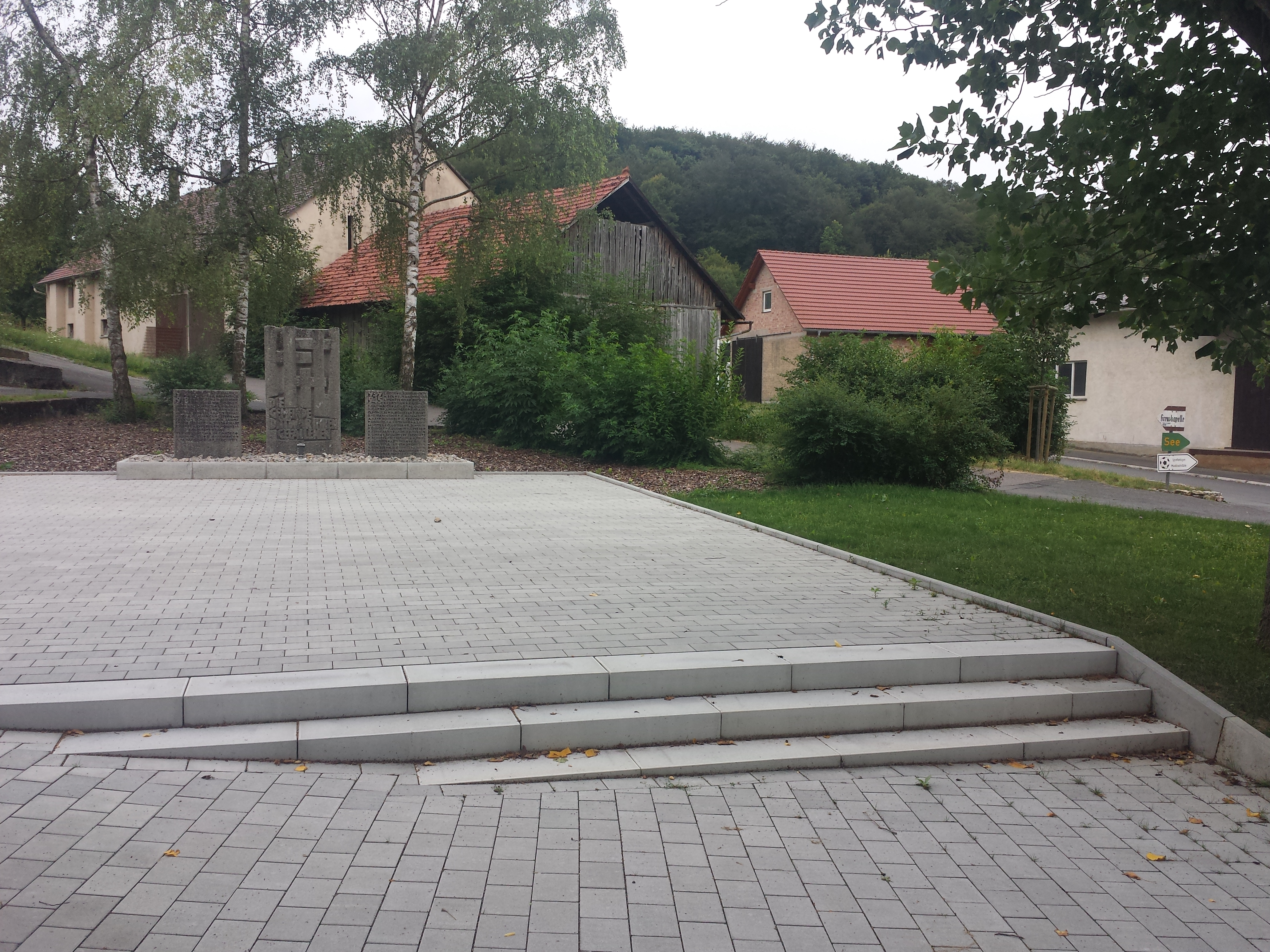 Das Dittwarer Kriegerdenkmal befindet sich am Dittwarer Friedhof. In der Mitte befindet sich ein Stein aus dem mehrere Kreuze herausgearbeitet sind, darunter die Inschrift "DIE GEMEINDE DITTWAR IHREN GEFALLENEN". Namensplatten aus Stein befinden sich daneben. Links (Erster Weltkrieg) und rechts (Zweiter Weltkrieg).